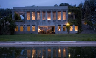 Casa en Abril, partido de Berazategui, Prov. de Buenos Aires, Argentina.Jacques Bedel recibe por esta obra el Gran Premio Latinoamericano en la VII Bienal de Arquitectura de Buenos Aires en 1998.